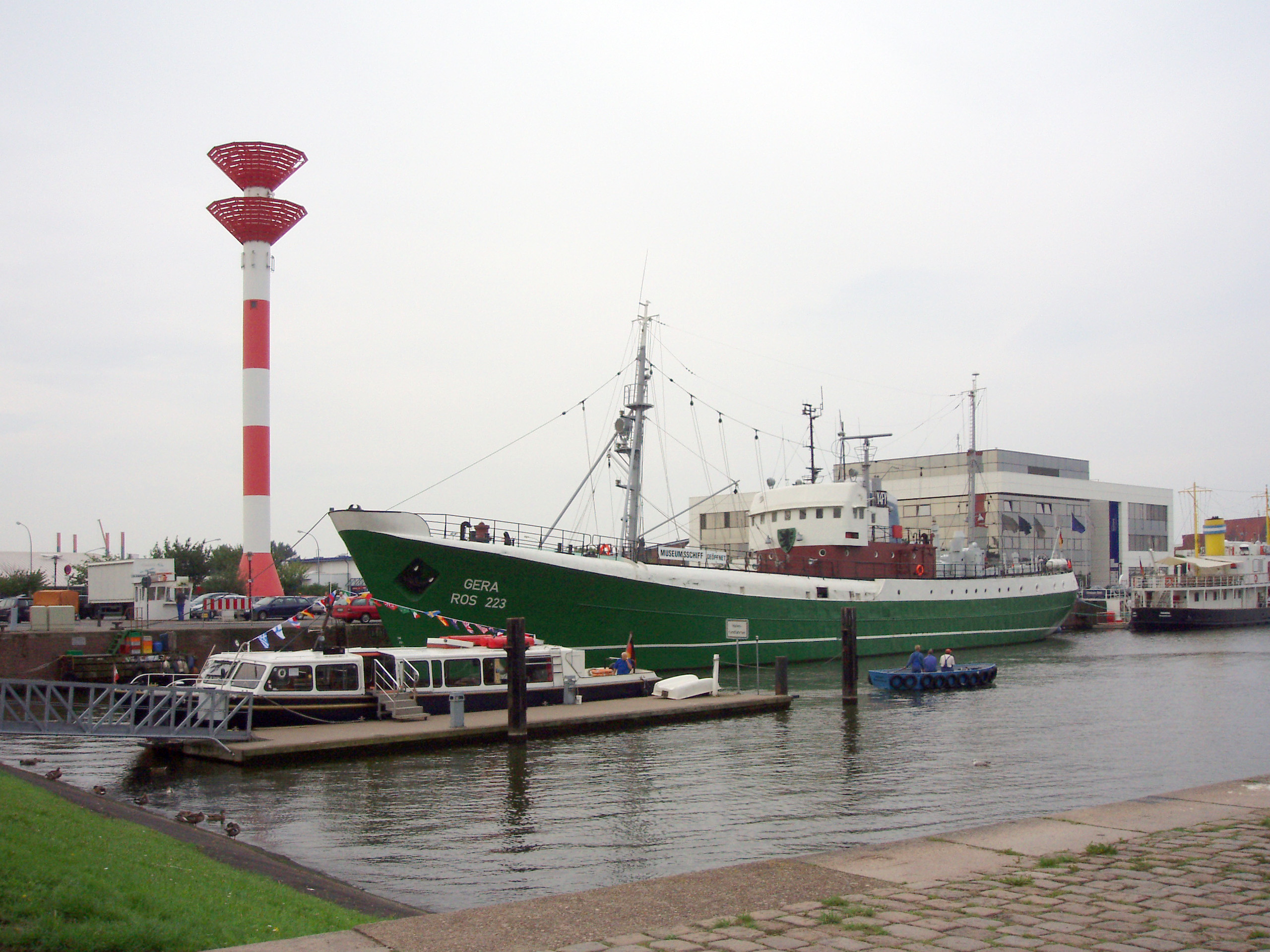 Museumsschiff Gera in Bremerhaven, im Hintergrund das Fischereihafen-Oberfeuer